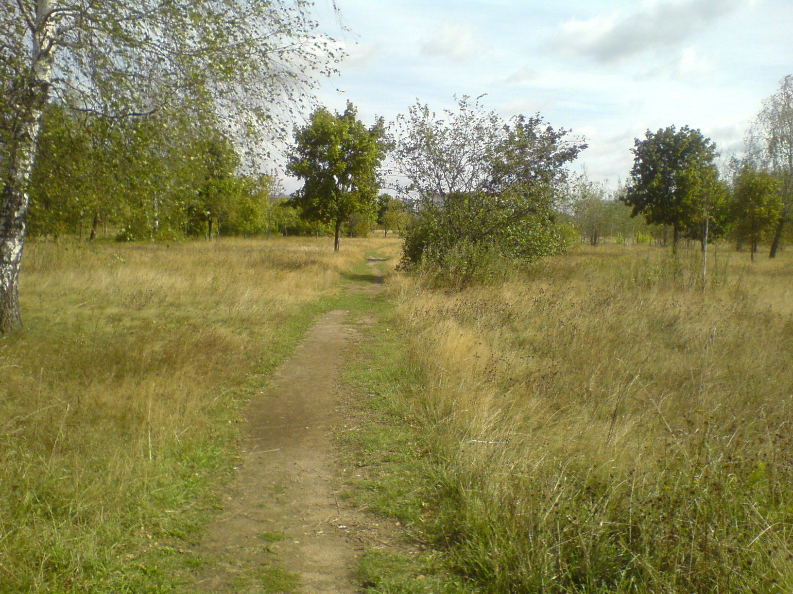 растительность в парке